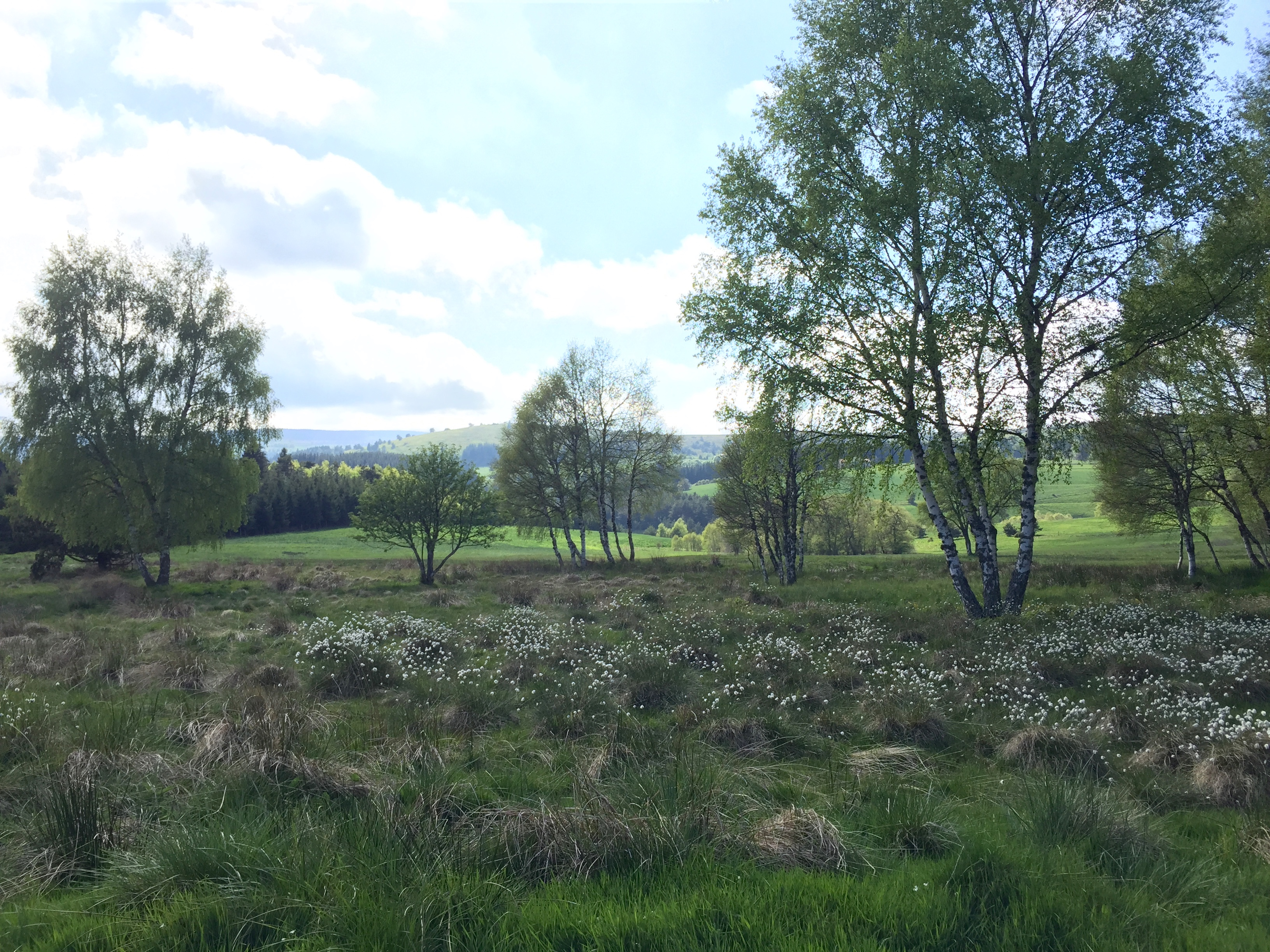 Paysage typique des hautes-chaumes, site classé Natura 2000.